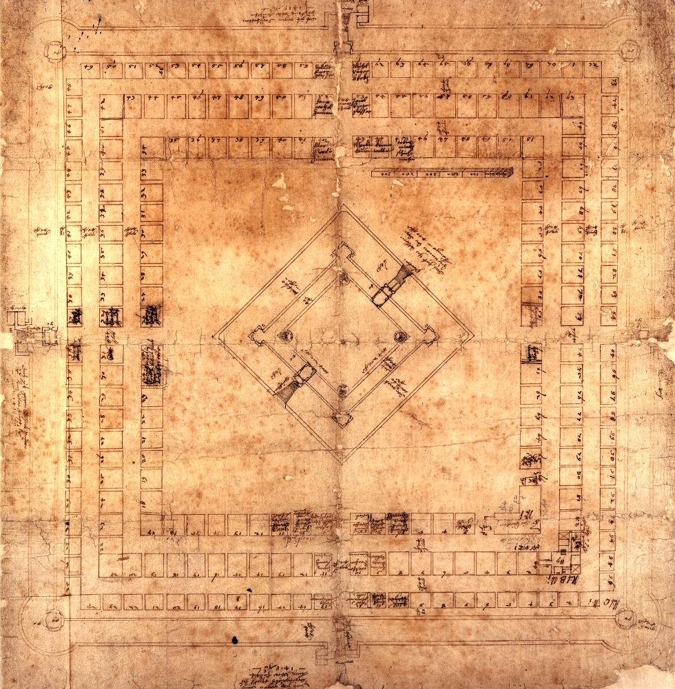 Der dritte und endgültige Plan von Heinrich Schickhardt für den Bau von Freudenstadt.